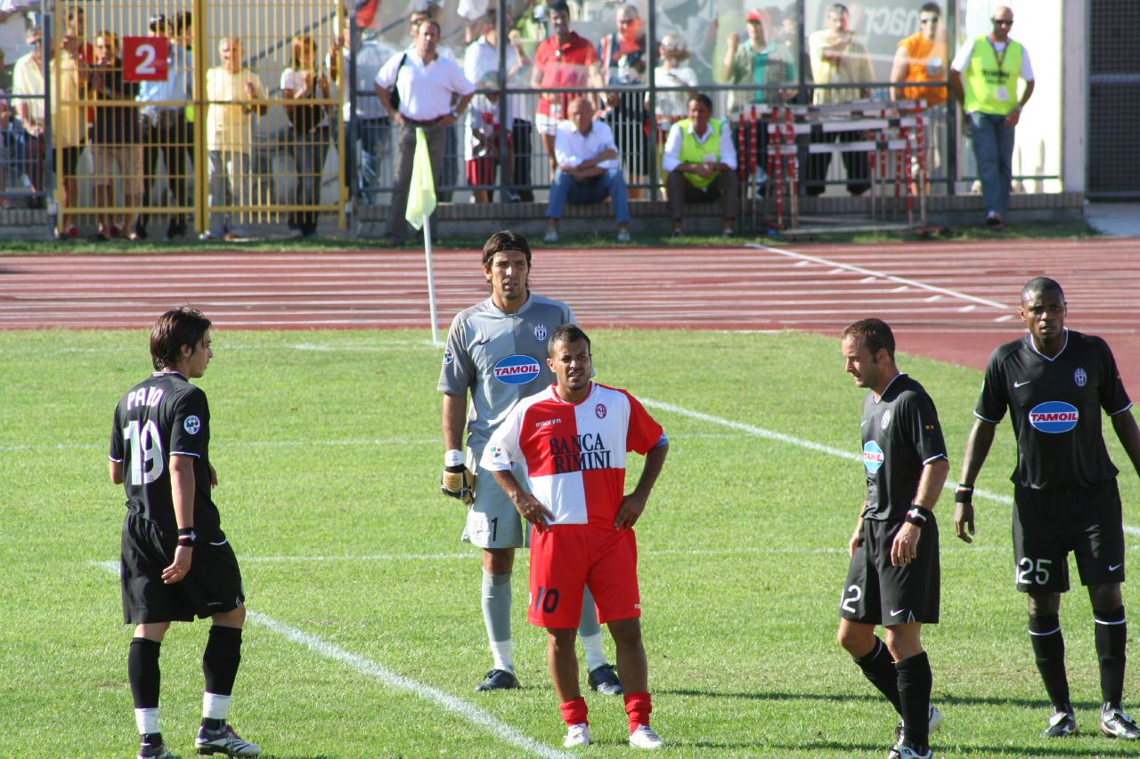 Rimini — Juventus (1-1), 1ª giornata del campionato italiano di Serie B 2006-07.